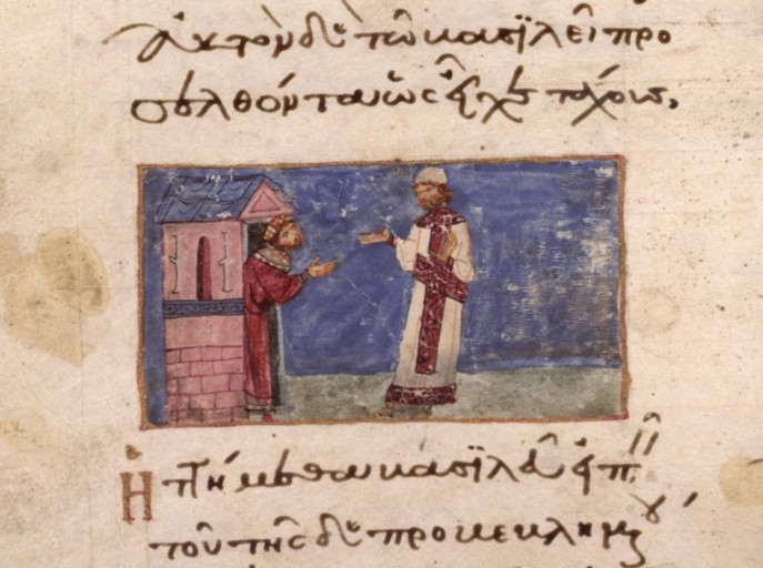 Representação do imperador Valente recebendo de seu oficial Domício Modesto a resposta do bispos Basílio de Cesareia.